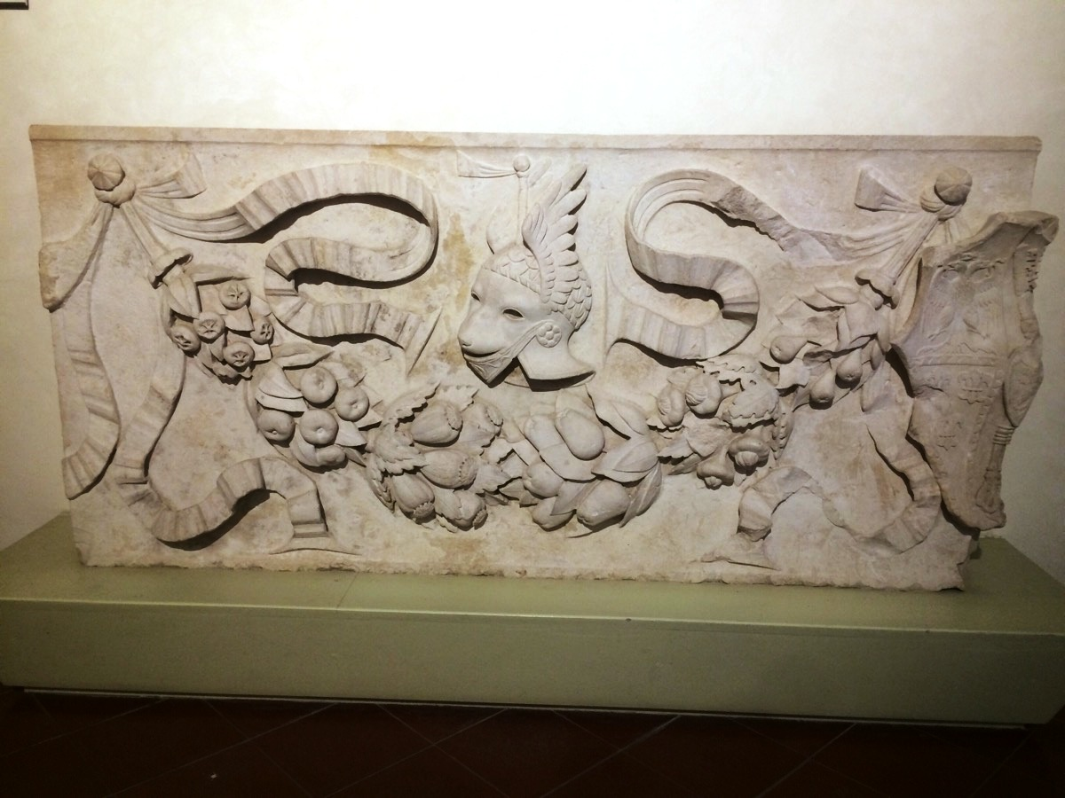 Bassorilievo in marmo scolpito facente parte del progetto di monumento equestre a Ercole I d'Este mai realizzato. L'opera è conservata presso il Museo di Casa Romei a Ferrara.